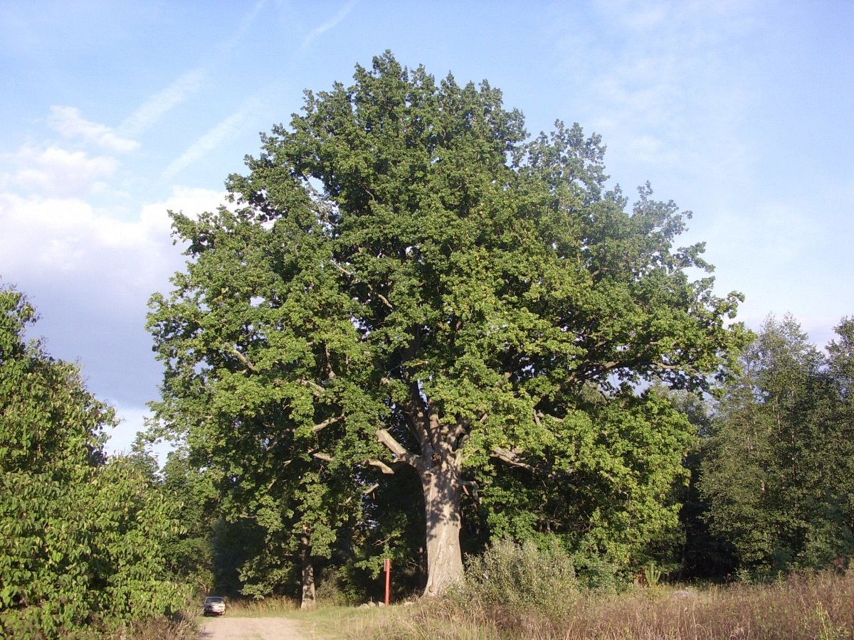 Тадуліна. Цар-дуб